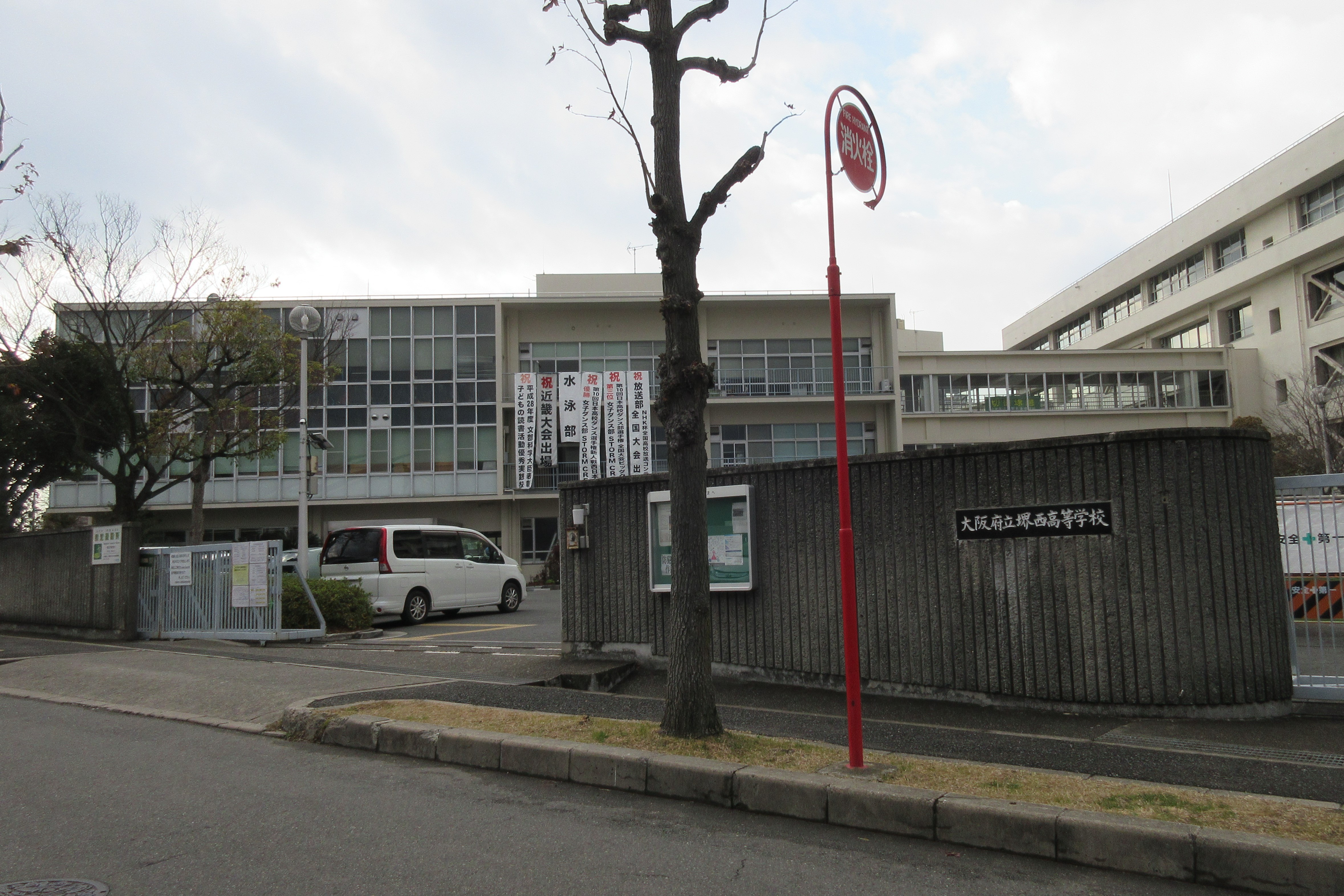 大阪府立堺西高等学校